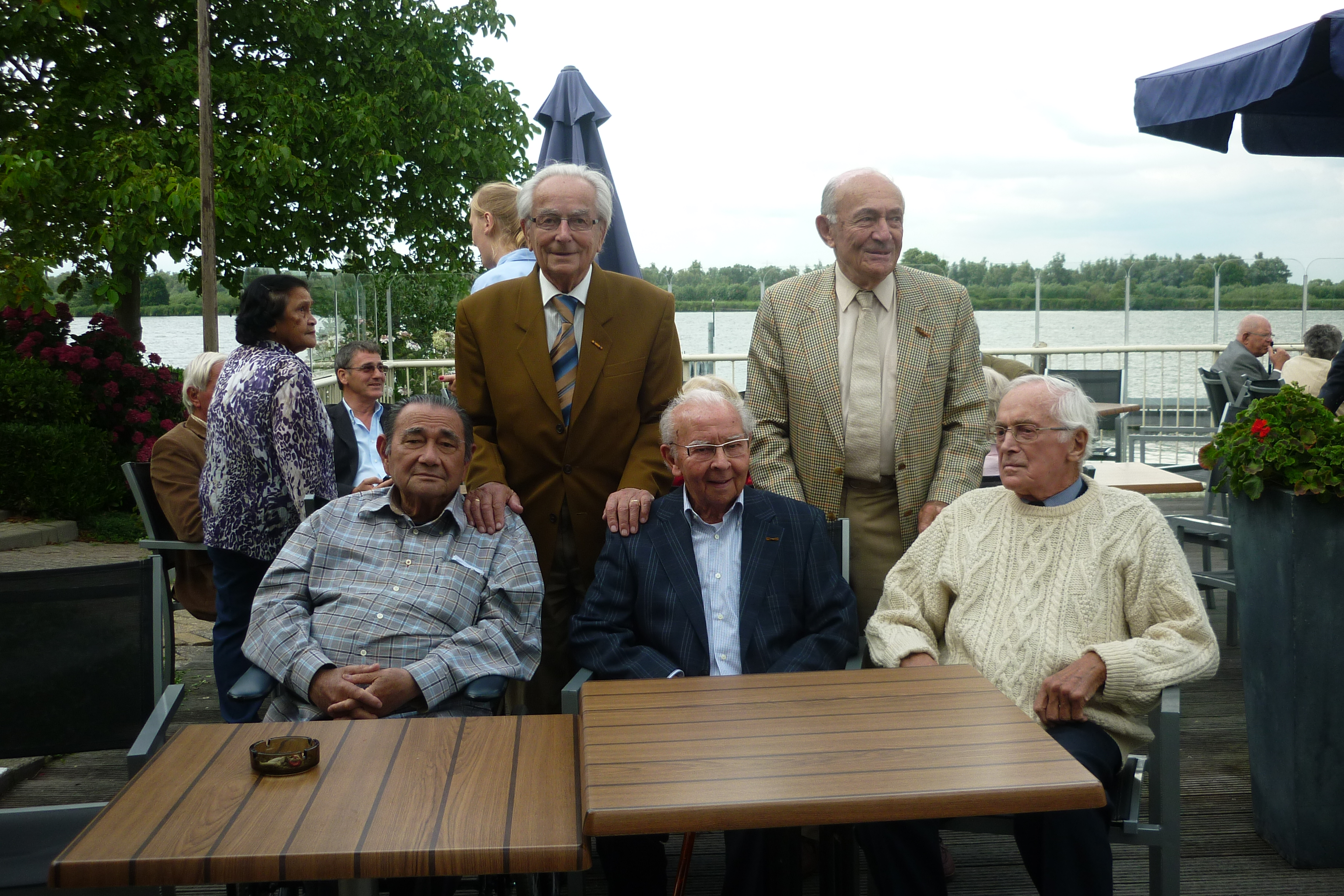 Vijf Ridders MWO op het terras van 't Voske in Lage Zwaluwe